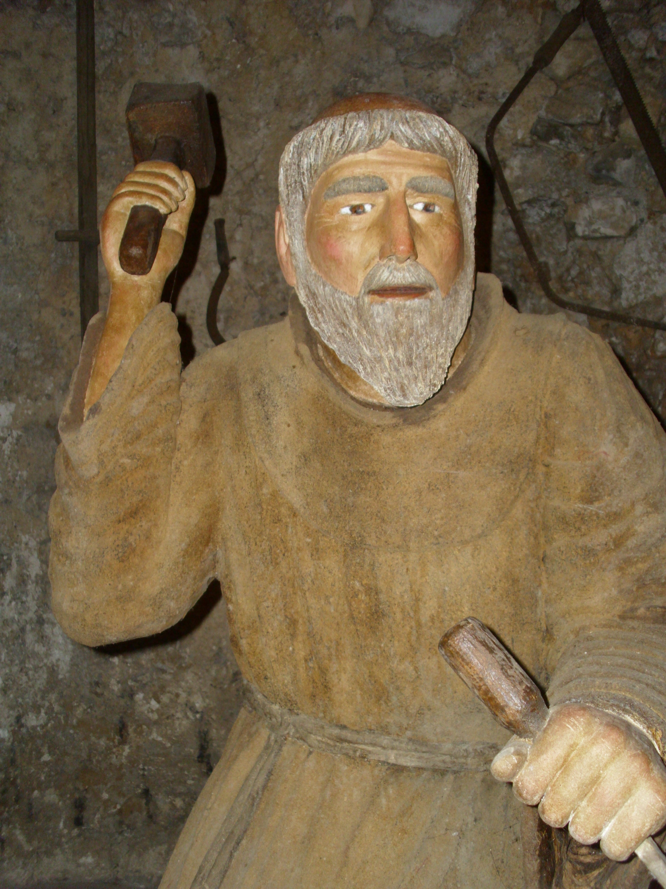 Il santuario del Crocefisso di Bassiano prende il nome dal crocifisso in legno scolpito dal frate Vincenzo Pietrosanti rappresentato da una statua a grandezza reale, che ho fotografato in occasione della mia visita. This is a photo of a monument which is part of cultural heritage of Italy.